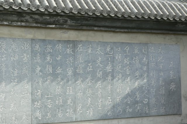 可在文天祥祠院内墙上的正气歌,拍摄